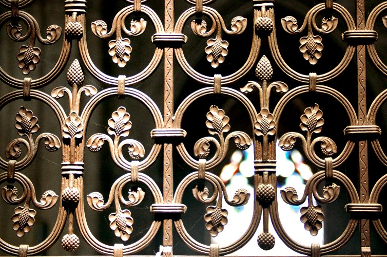 Les grilles du chœur de la Cathédrale St Étienne réalisées par le ferronnier d'art Pierre Boulanger en 1854